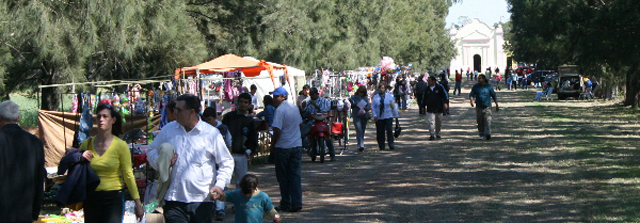 El-Sombrerito.jpg